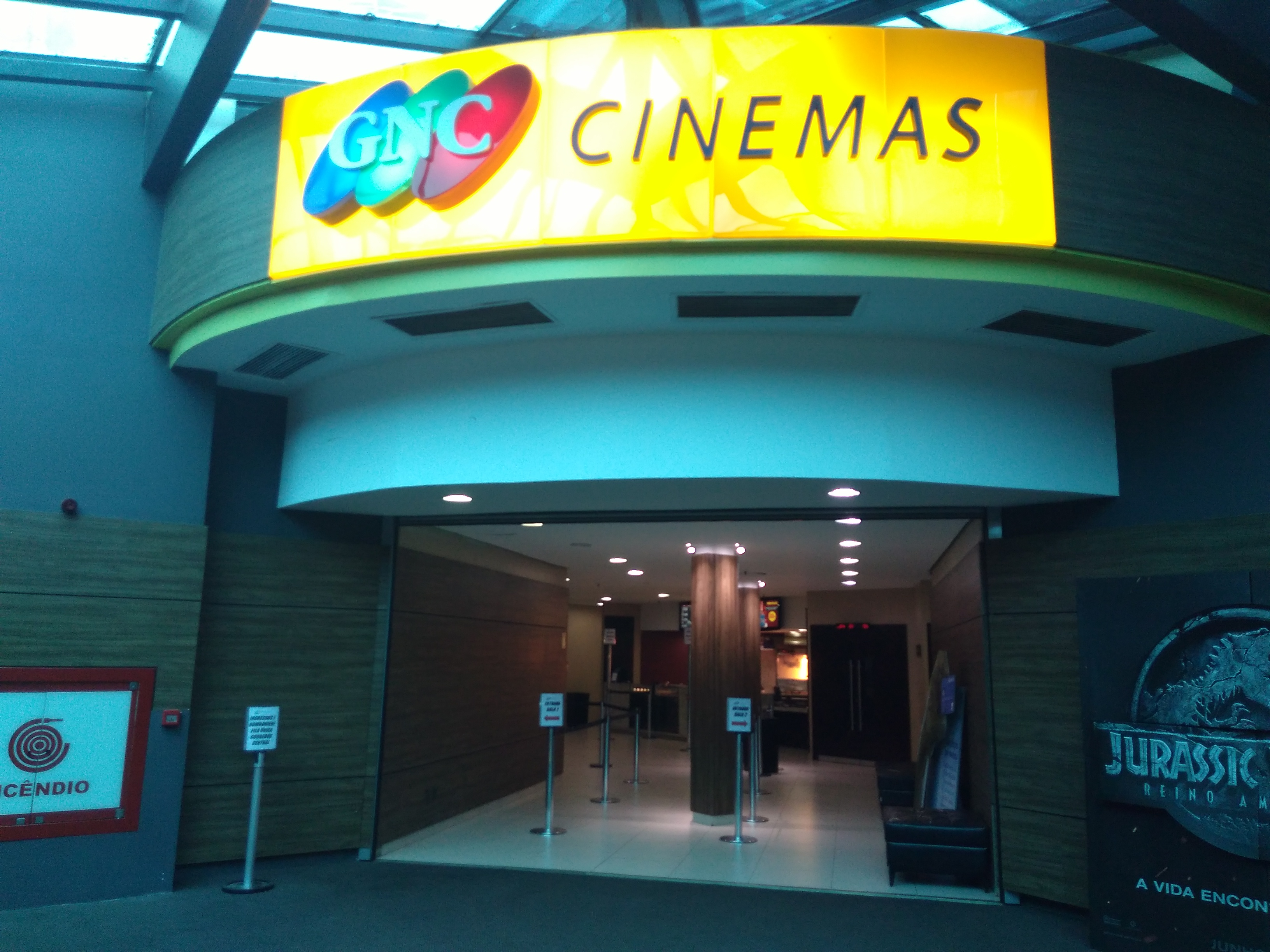 Vista da entrada do GNC Cinemas Lindóia de Porto Alegre, RS